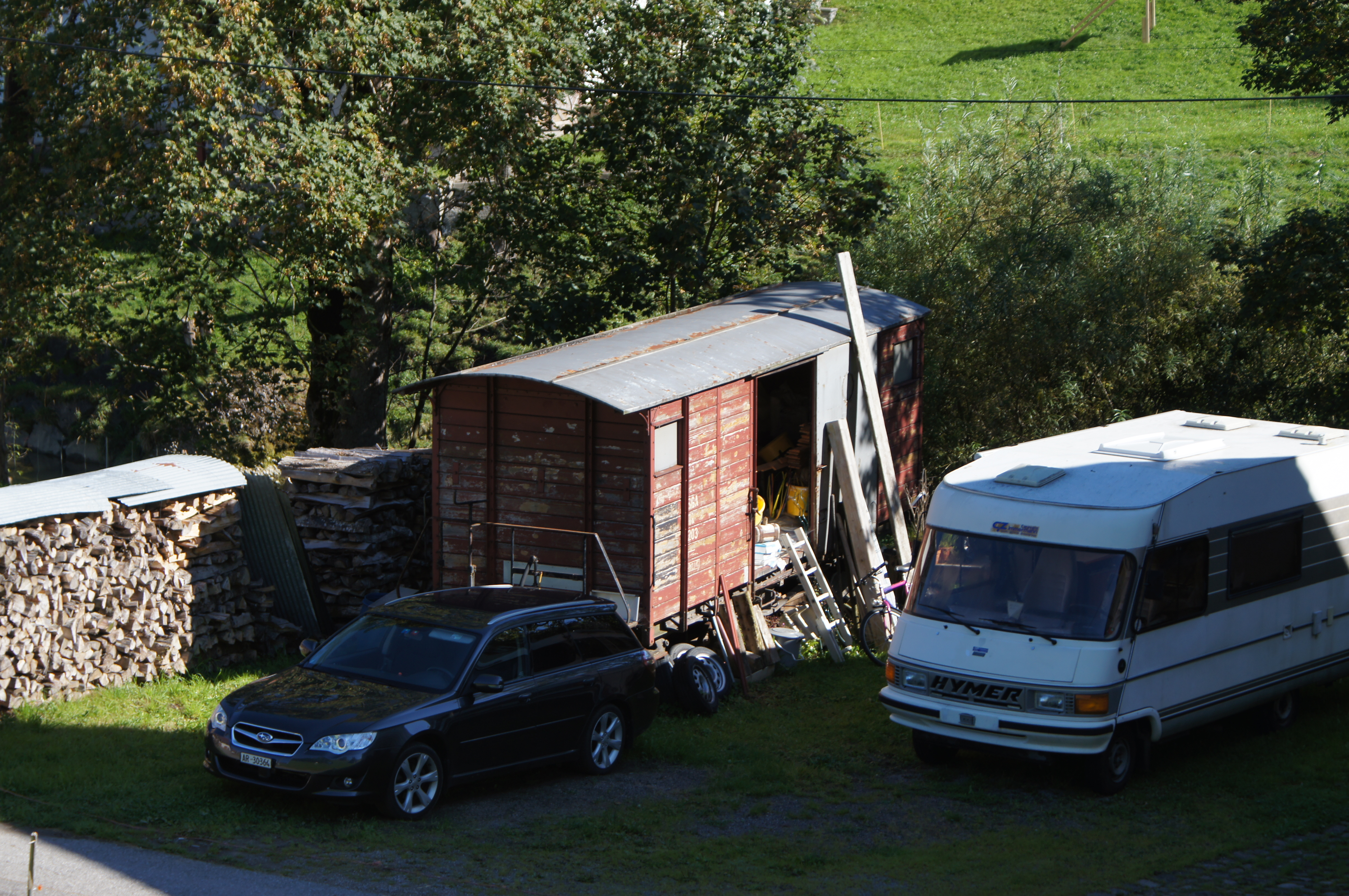 Gk 203 der Appenzeller Bahnen als Geräteschopf unterhalb des Bahnhofs Zürchersmühle (Gemeinde Urnäsch)